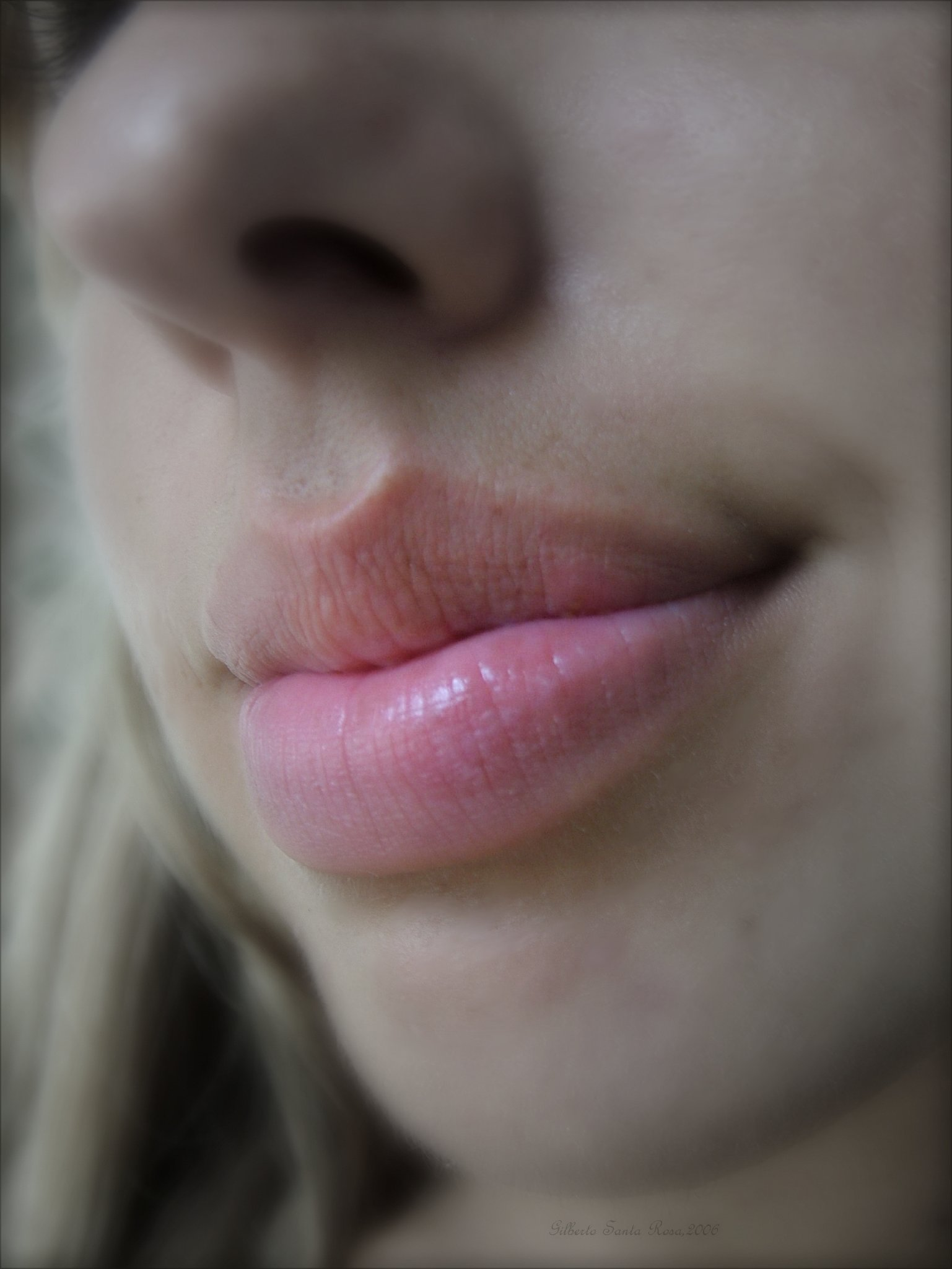 Beautiful lips.